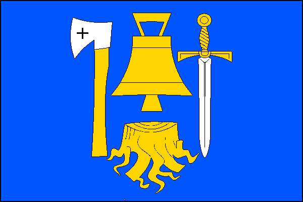 vlajka, Šumná, okres Znojmo